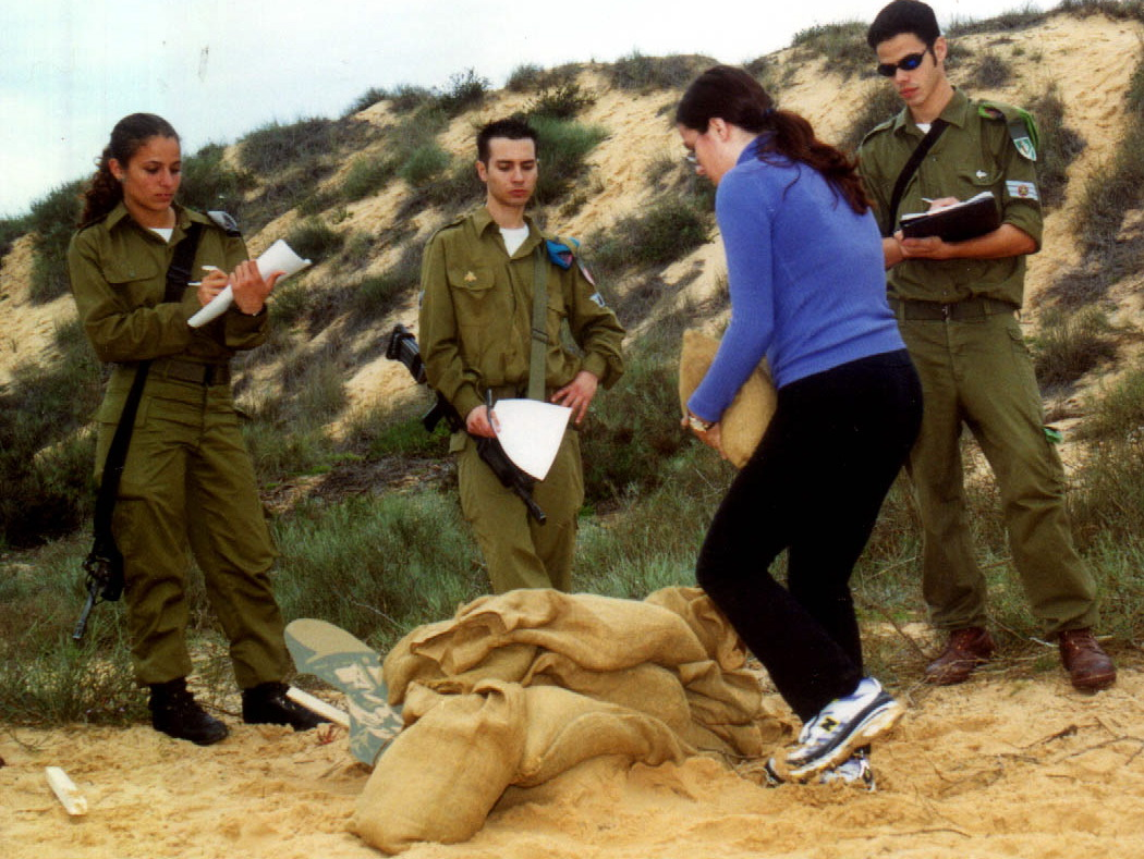 January 23, 2001. The Nitzanim Training Base holds tryouts for potential female combat soldiers hoping to be accepted into the Armored Corps and the Combat Engineering Corps. בסיס ניצנים עורך יום גיבוש עבור בנות המבקשות להתקבל לתפקידים קרביים בחיל השריון או חיל ההנדסה הקרבית.